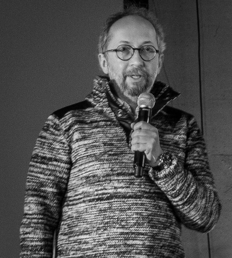 Maciej Ślesicki w październiku 2013 podczas konferencji produktowej firmy CDP.pl